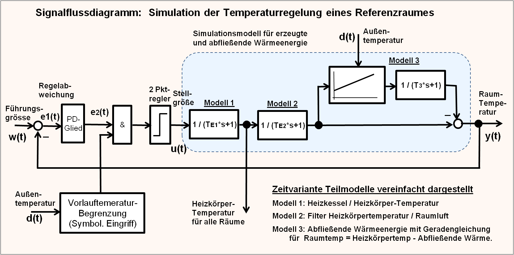 Signalflussdiagramm für die Simulation eines Referenzraum-Regelkreises einer Gebäudeheizung.